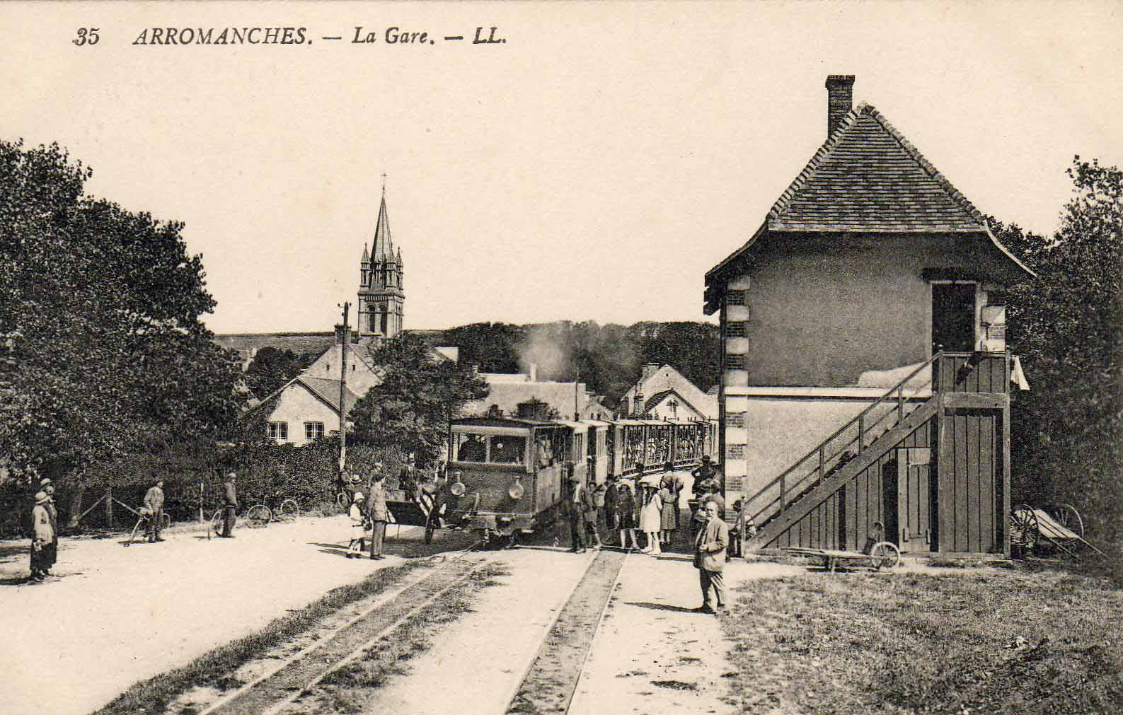 Gare des Chemins de fer du Calvados à Arromanches